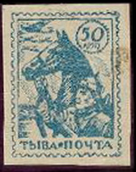 Пробная почтовая марка Тувинской Народной Республики, 1942 год. Красноармеец с конём